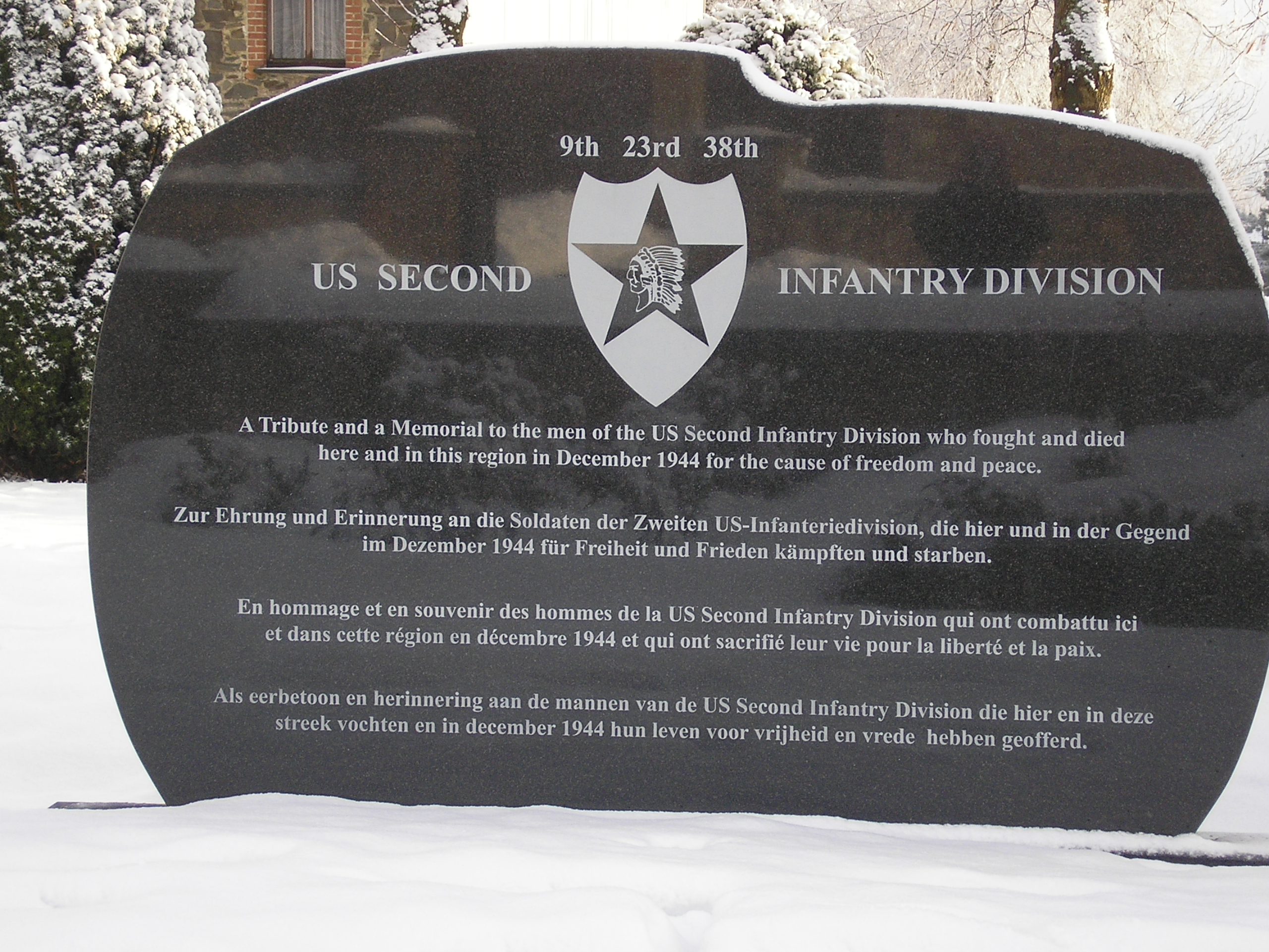 Gedenkstein in Krinkelt